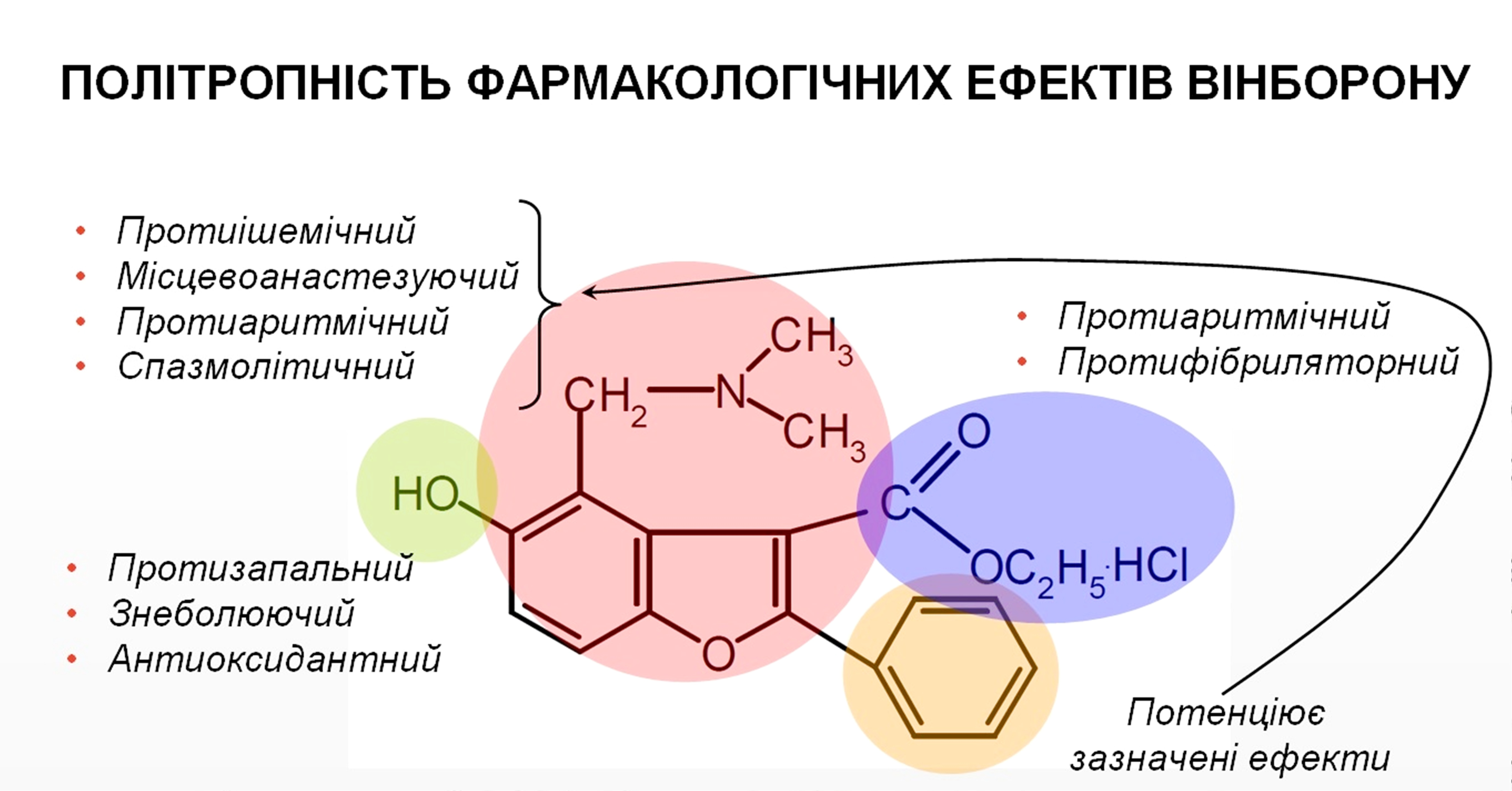 вінборон